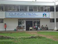 Entrada Principal